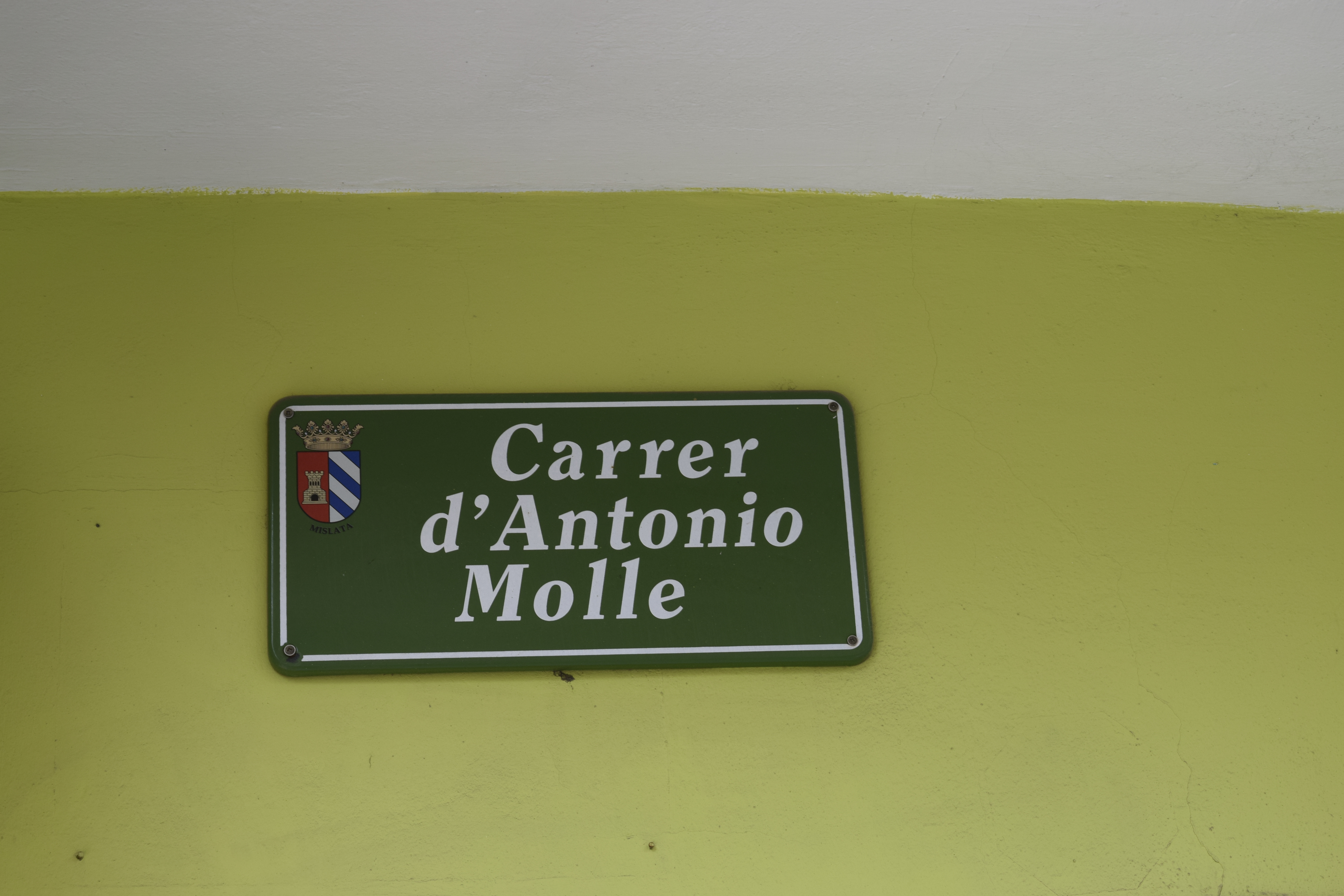 Calle dedicada al mártir Antonio Molle en Mislata